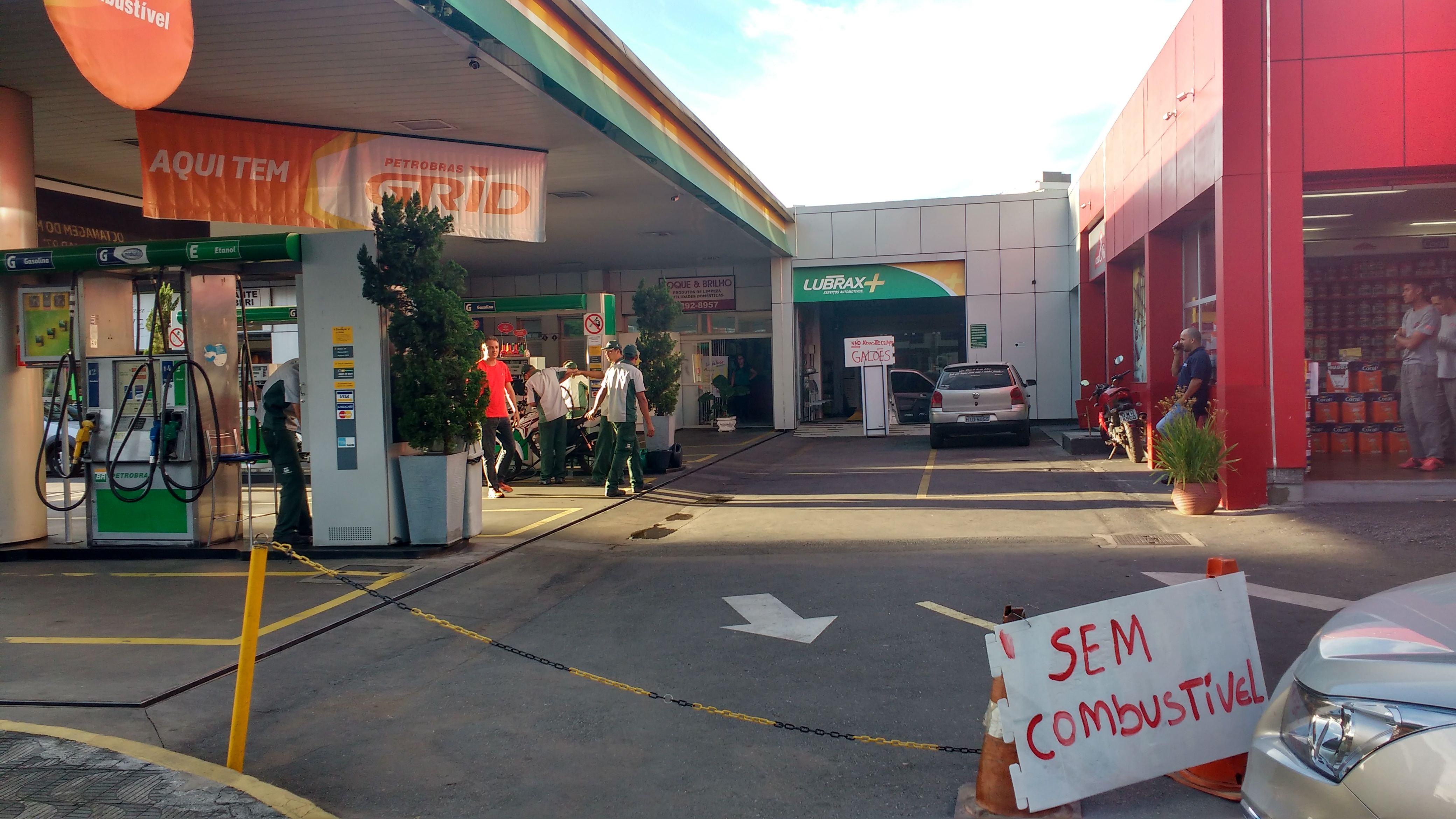 Placa indicando que o posto está sem combustível em frente a um carro que está aguardando na fila para abastecer, em um posto de gasolina de Belo Horizonte, durante a Greve dos Caminhoneiros no Brasil de 2018.